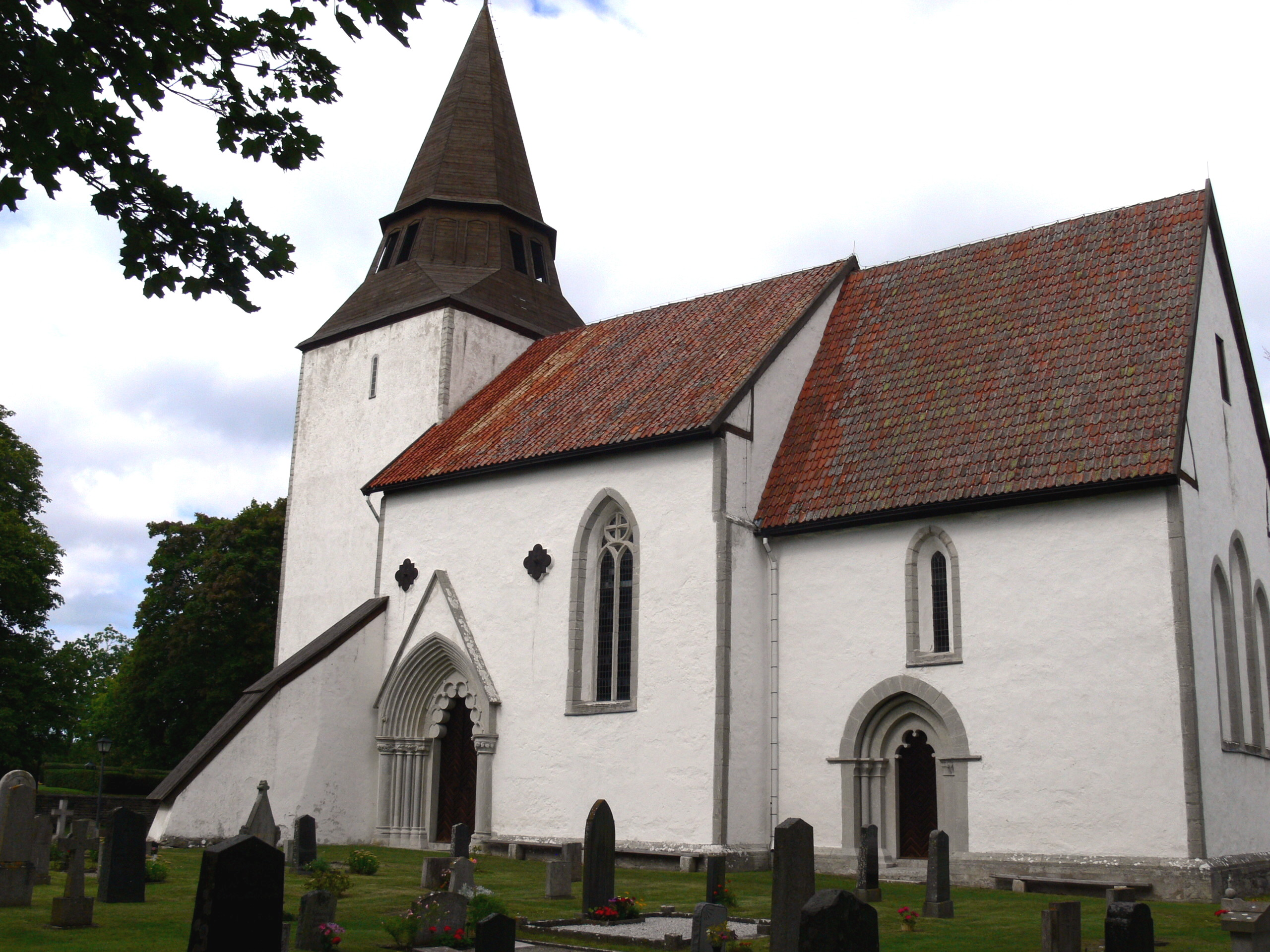 Boge kyrka auf Gotland. Außenansicht